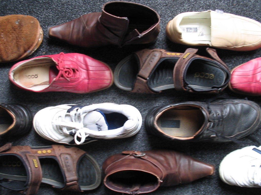 schoeisel (en een poging om artistiek te zijn)